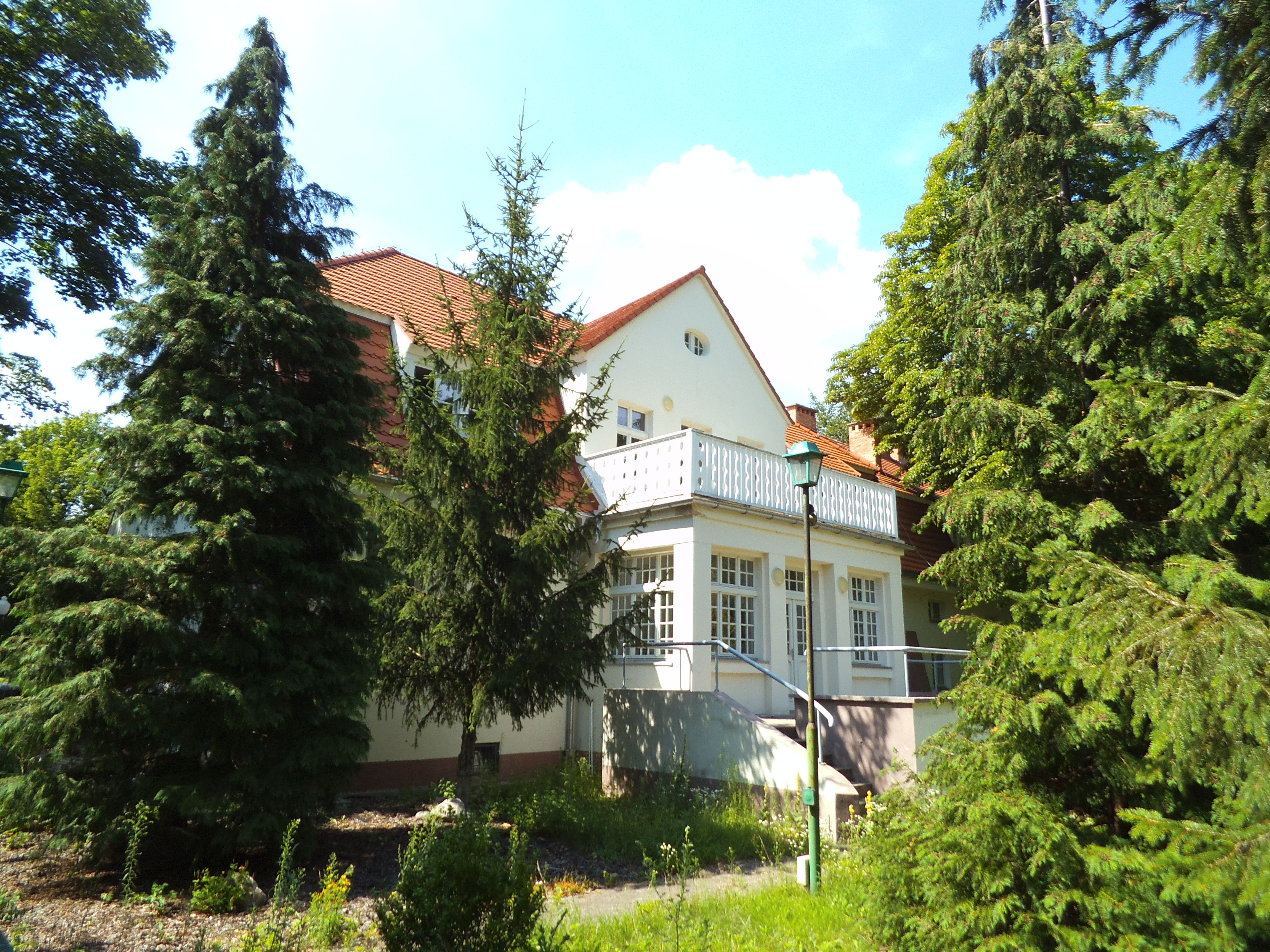 Hospicjum Światło im. Jana Pawła II w Toruniu